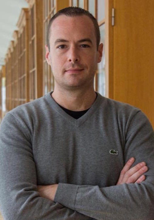 Французский историк, общественный деятель